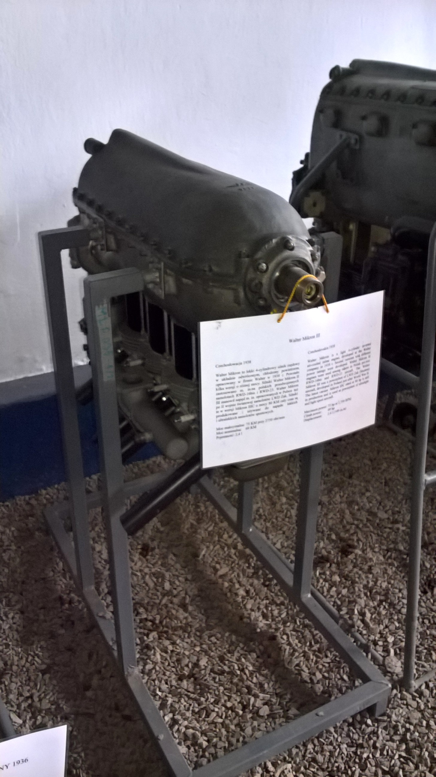 Czechosłowacki 4-cylindrowy silnik rzędowy Walter Mikron III z 1938 r. ze zbiorów Muzeum Lotnictwa Polskiego w Krakowie.